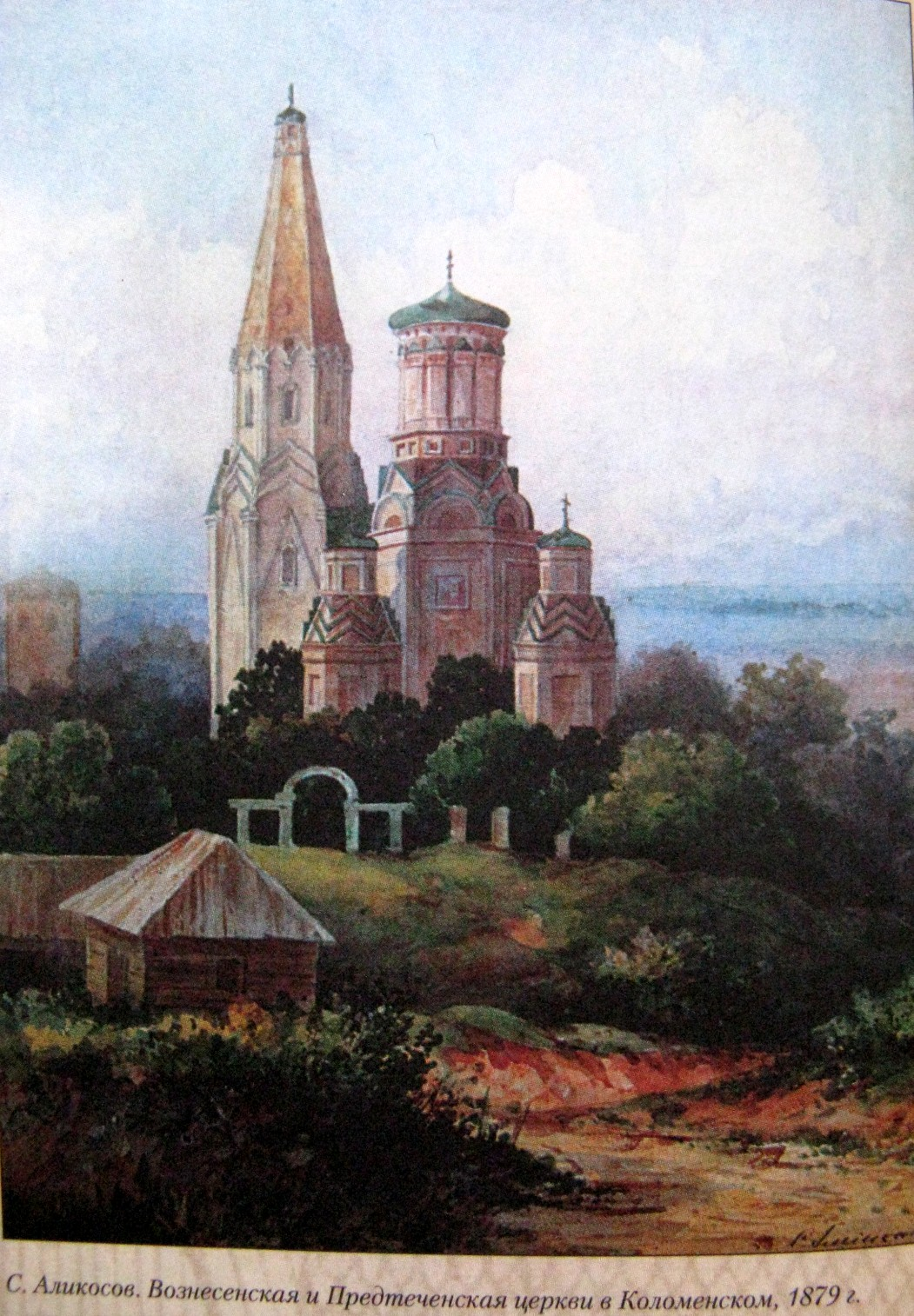 Вознесенская и Предтеченская церкви в Коломенском. Church of the Ascension and St. John the Baptist in the village of Kolomenskoe.